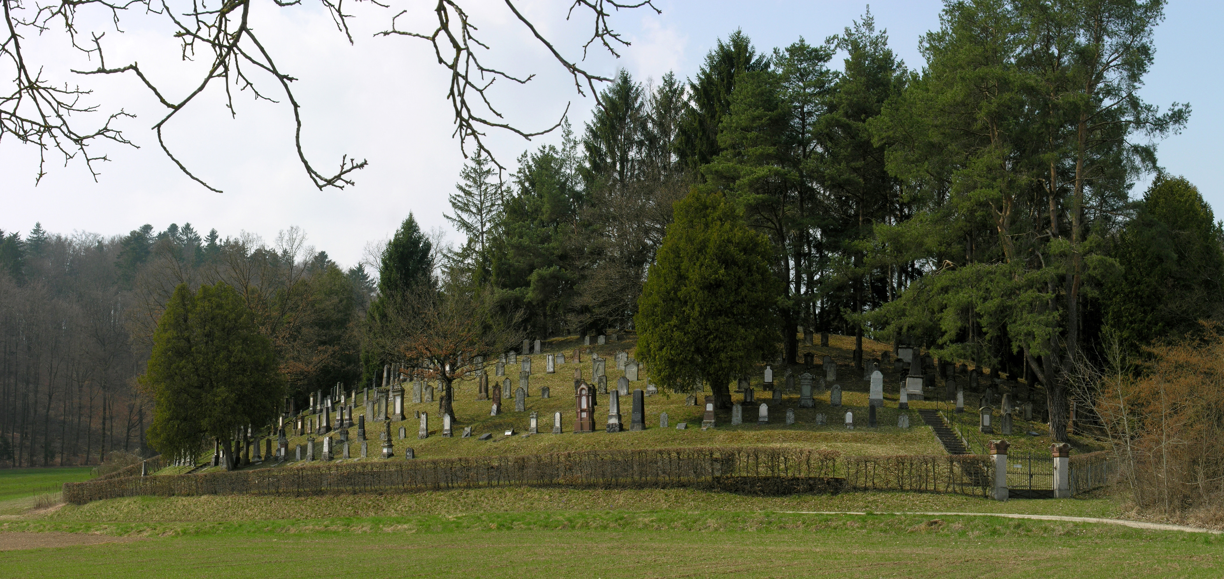 Germany, Baden-Württemberg, Jewish Cemetry in Randegg